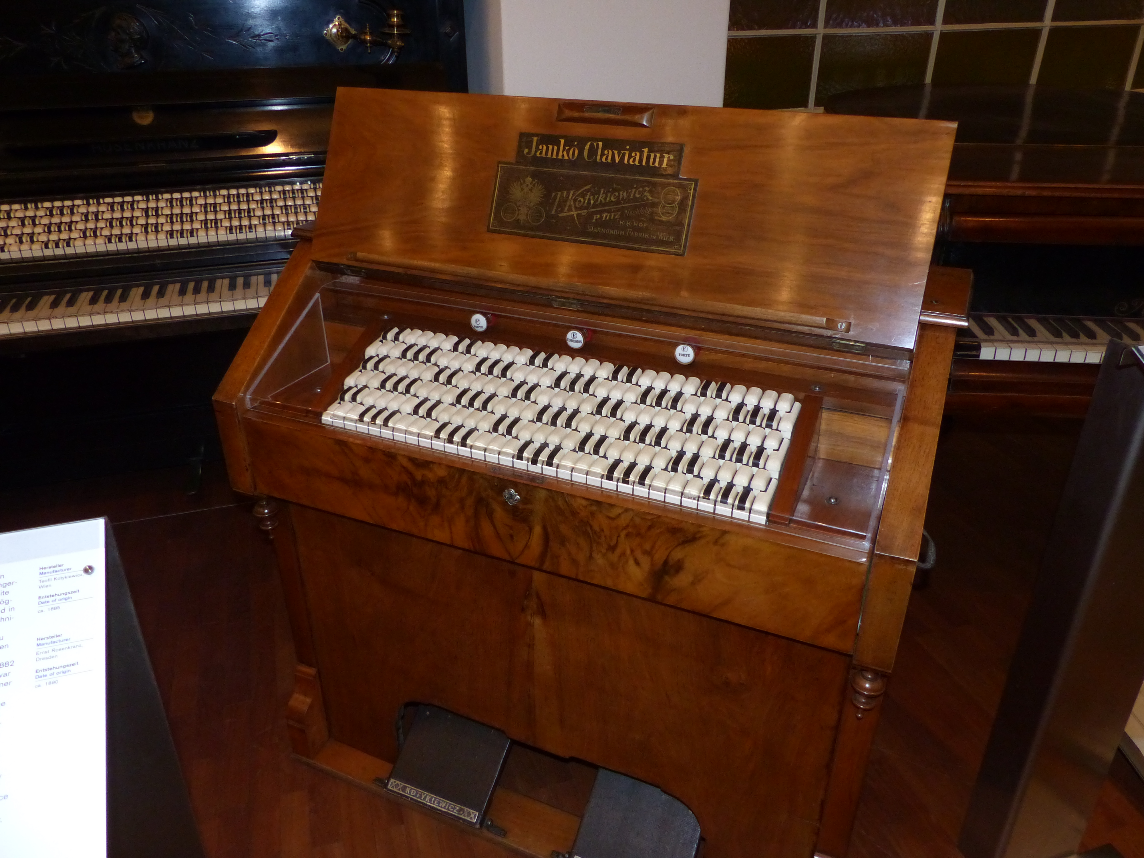 Instrument mit Jankó-Klaviatur, 1885, Hersteller: Teofil Kotykiewicz, Wien; Exponat im Technischen Museum Wien